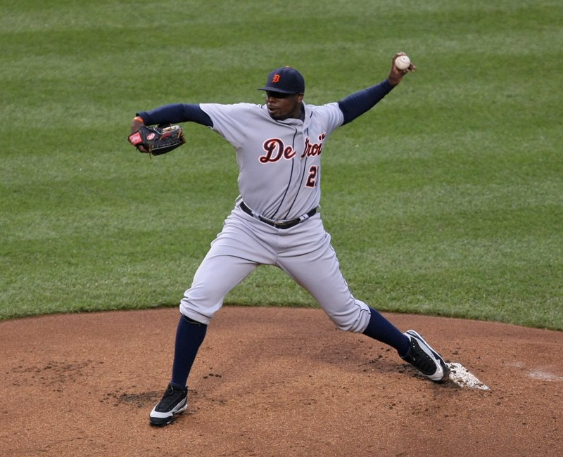 Dontrelle Willis